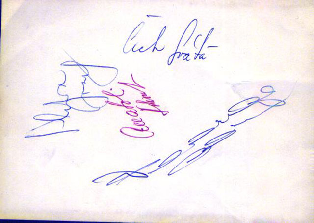 Autogramy Rebels